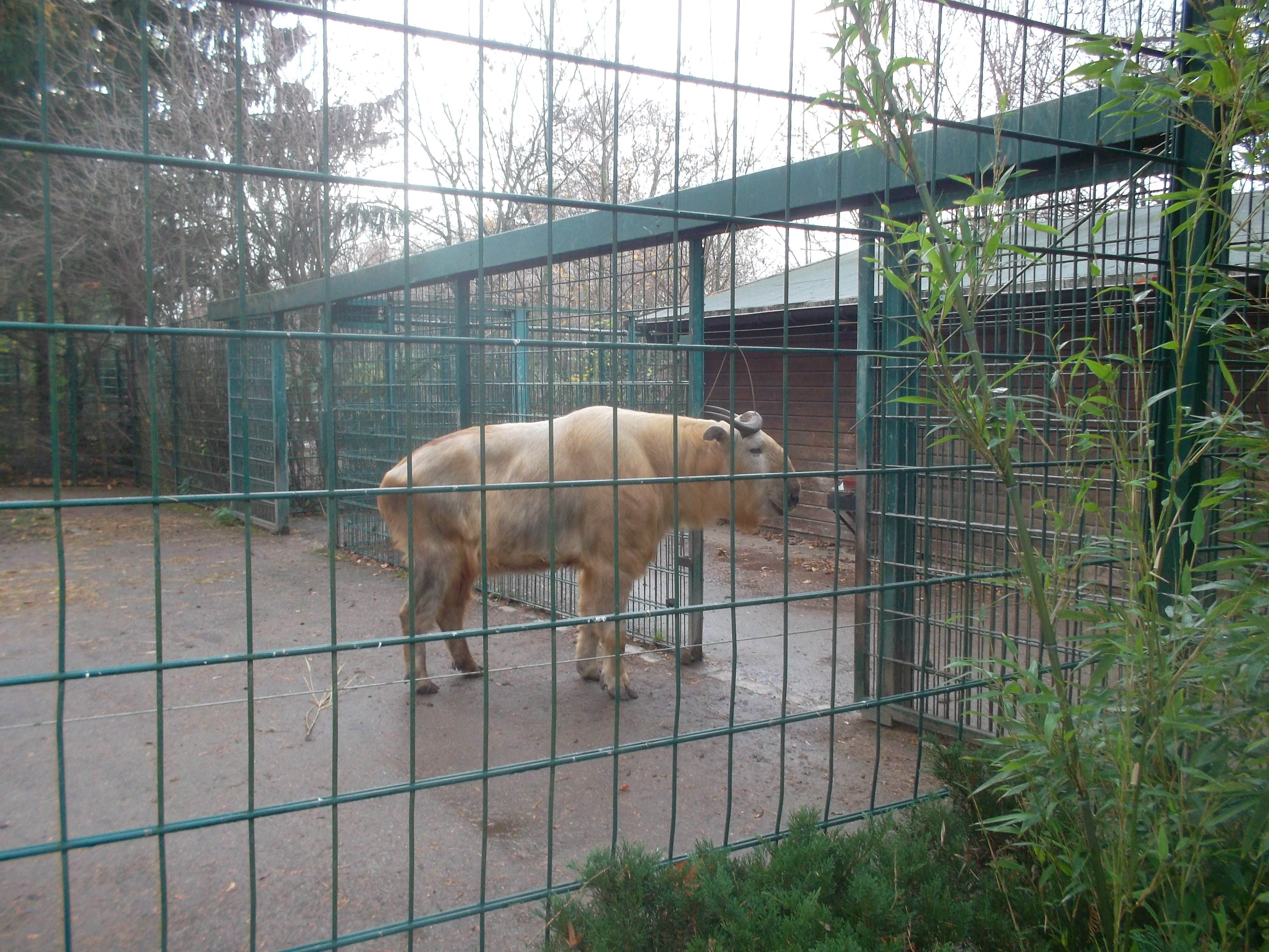 männlicher Goldener Takin Shen (Budorcas taxicolor bedfordi) im Zoo der Stadt Dresden